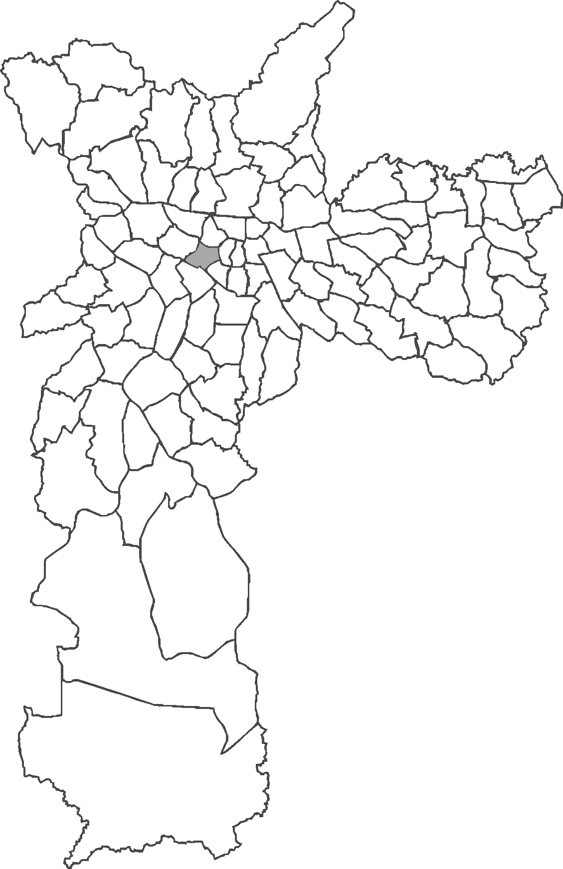 Localização do distrito da Consolação no município de São Paulo.